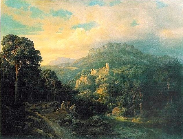 Schloss Bechburg bei Solothurn